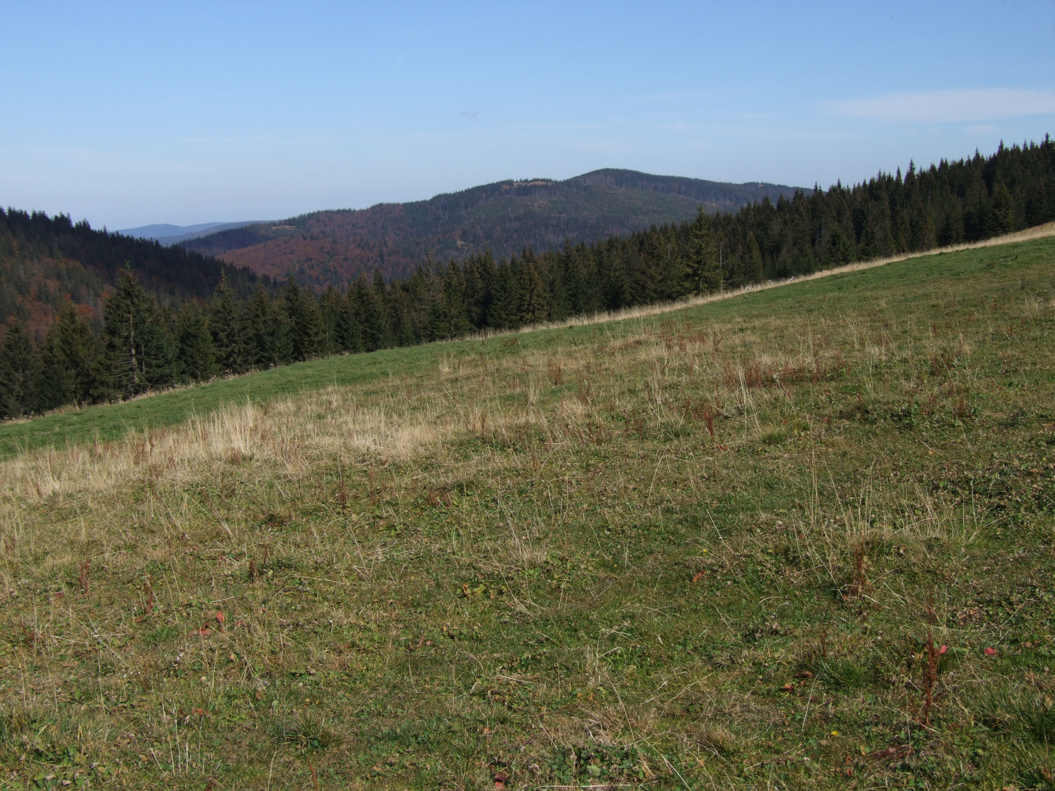 Hala Długa pod Turbaczem. Widok na Kudłoń i Beskid Wyspowy